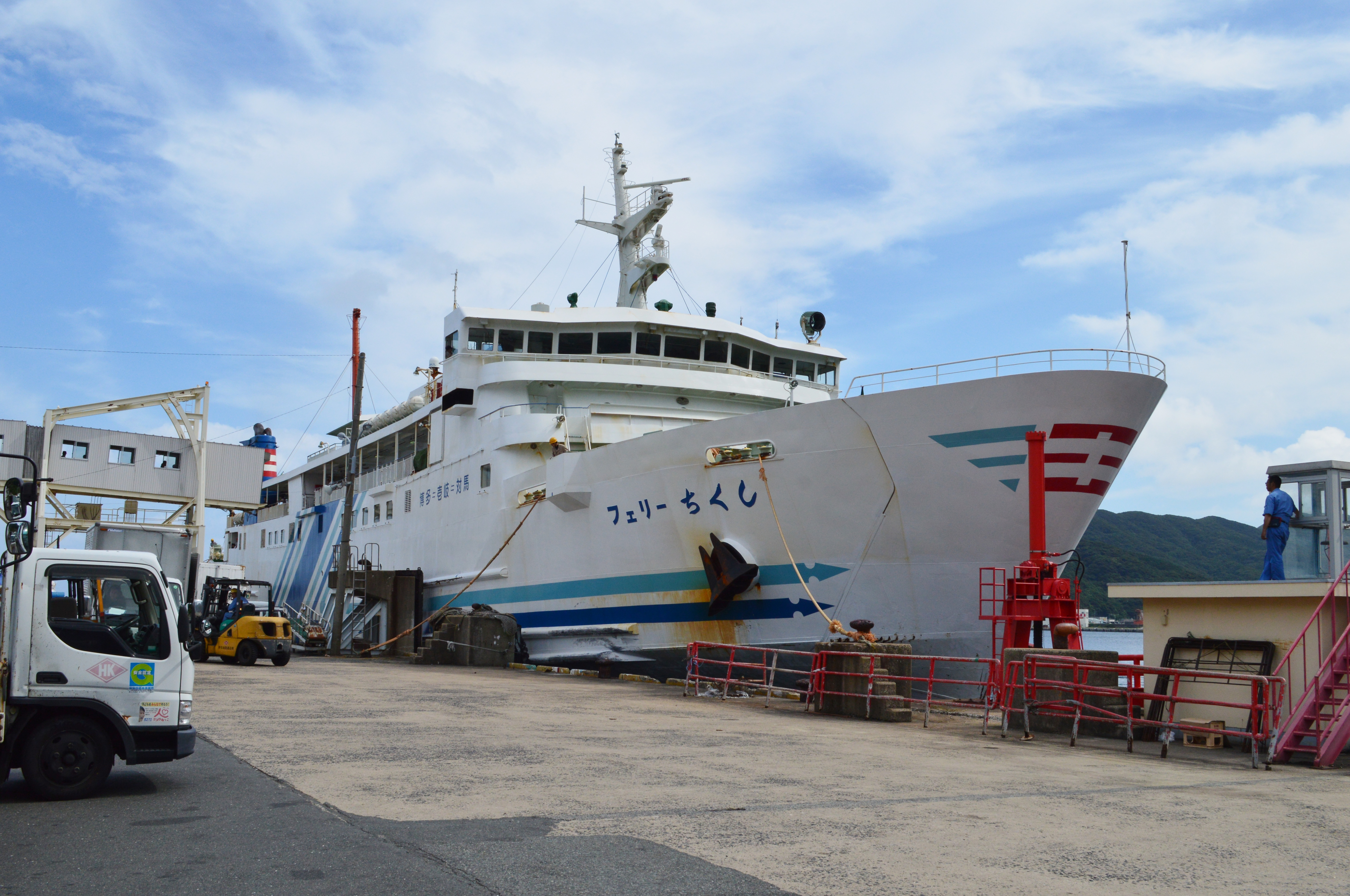 フェリーちくし (厳原港にて)